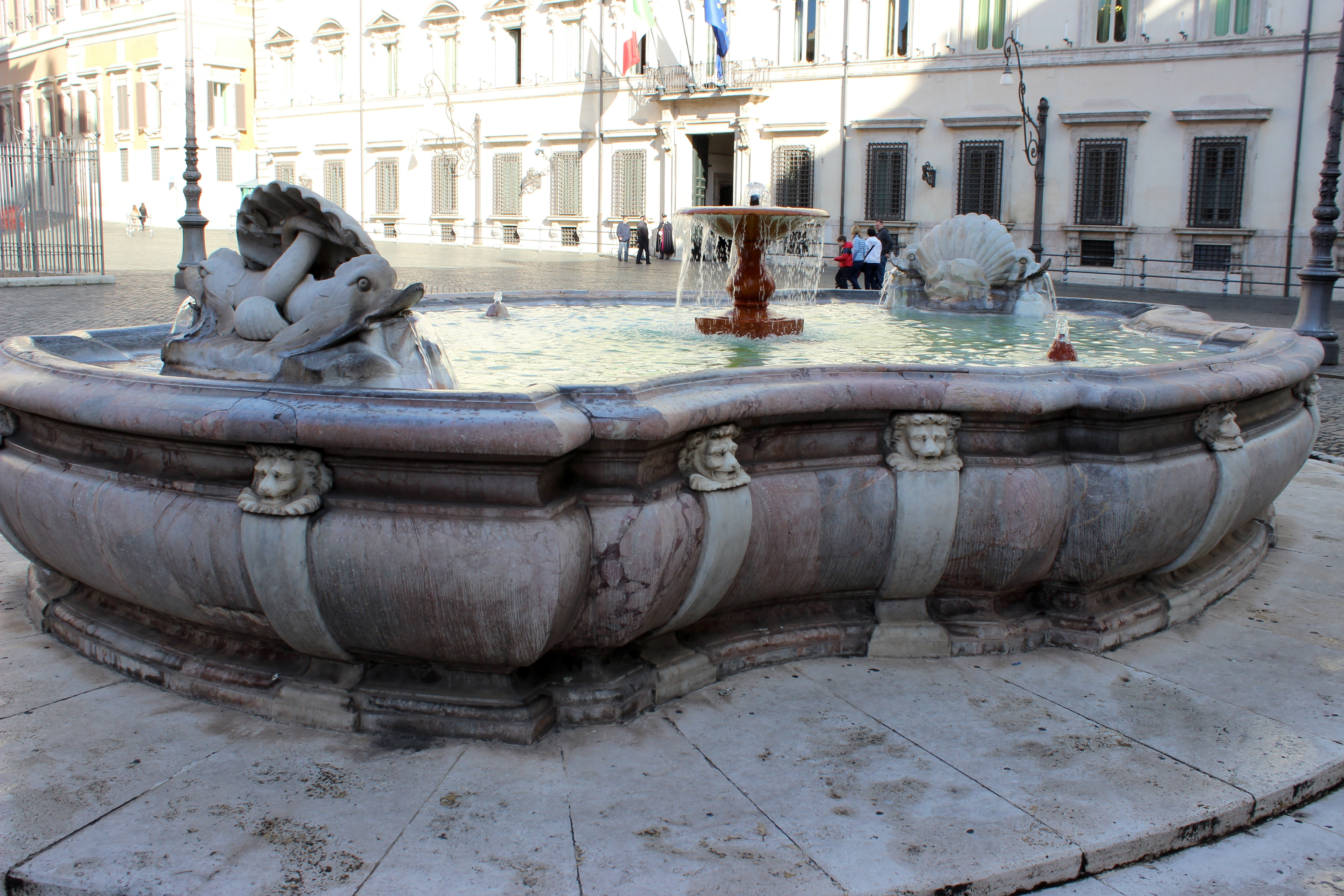 Roma. Fontana di Piazza Colonna.